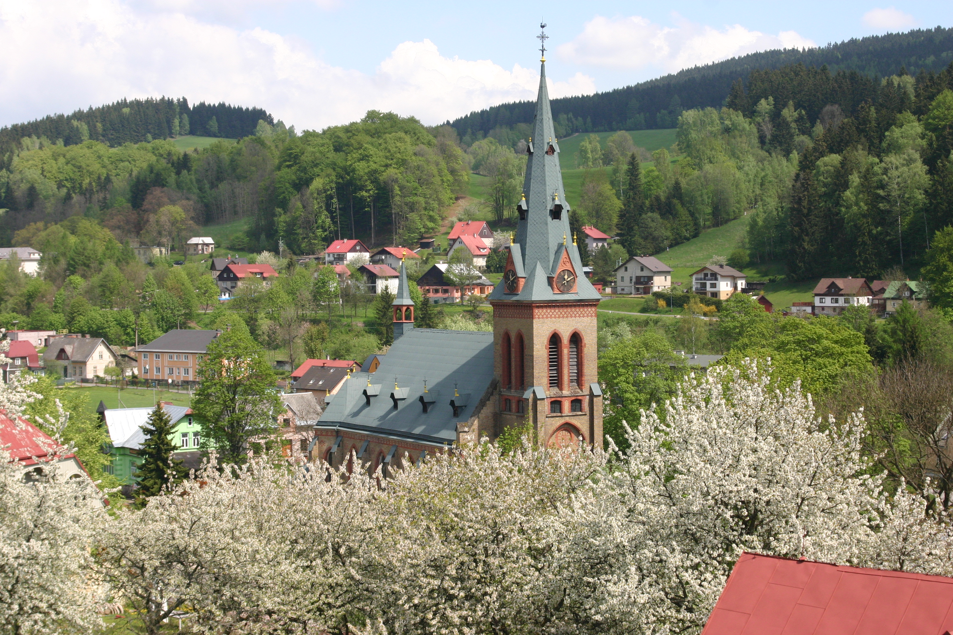 Kostel Nanebevzetí Panny Marie v Horním Maršově